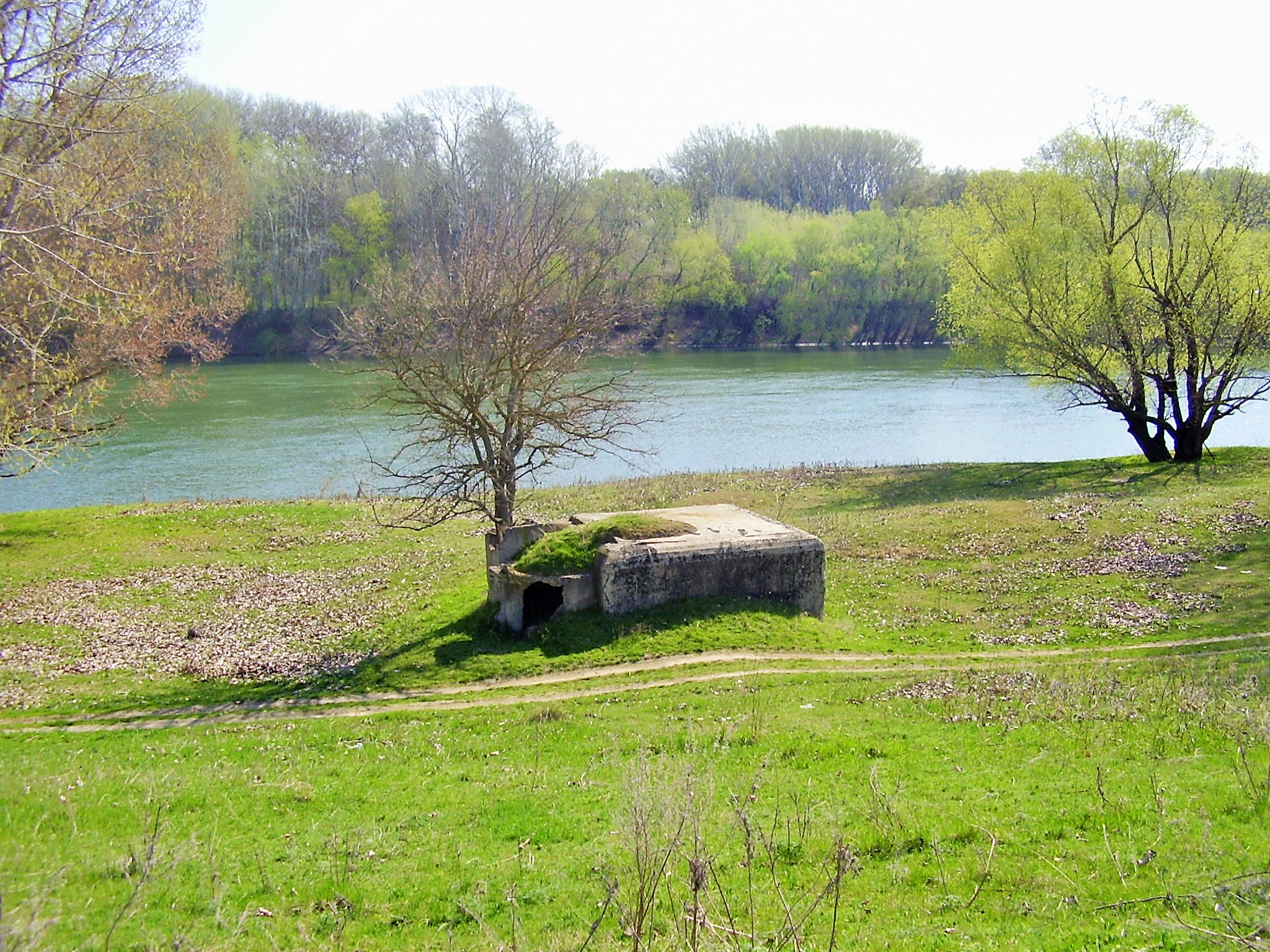 Дот недалеко от с. Терновка